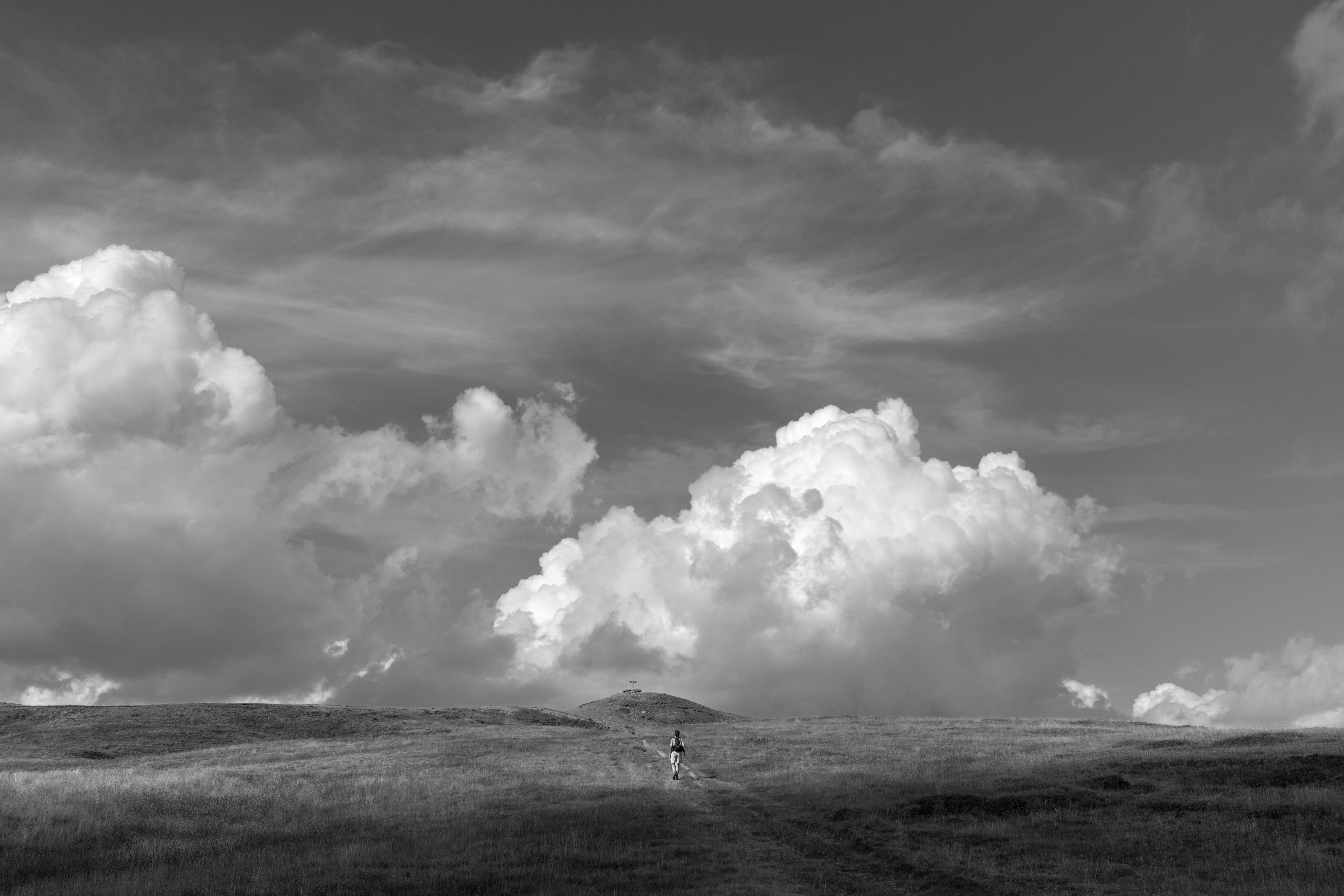 Passone - Villa Minozzo, Reggio Emilia, Italia